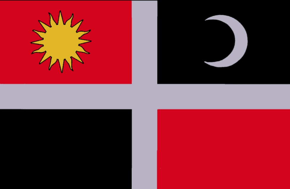 A csángók zászlaja/Flag of csángós